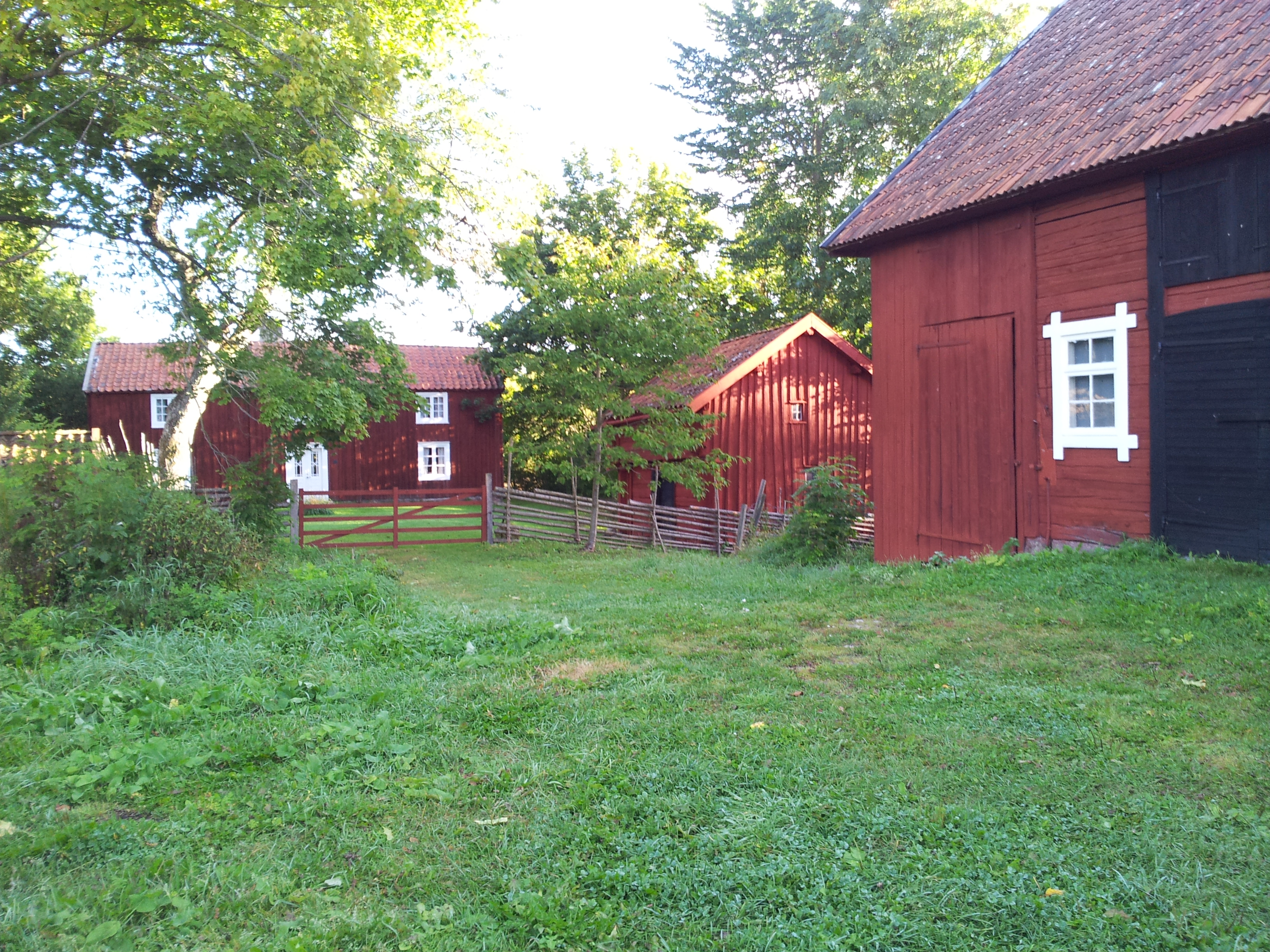 Nyebogården (Nyebo 5:7)